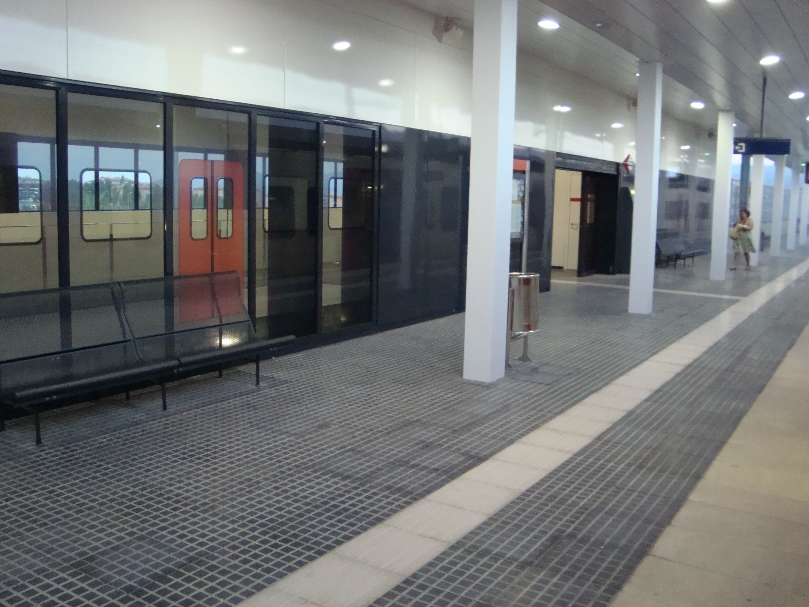 L'estació de tren de Volpelleres (Vallès Occidental, Catalunya).